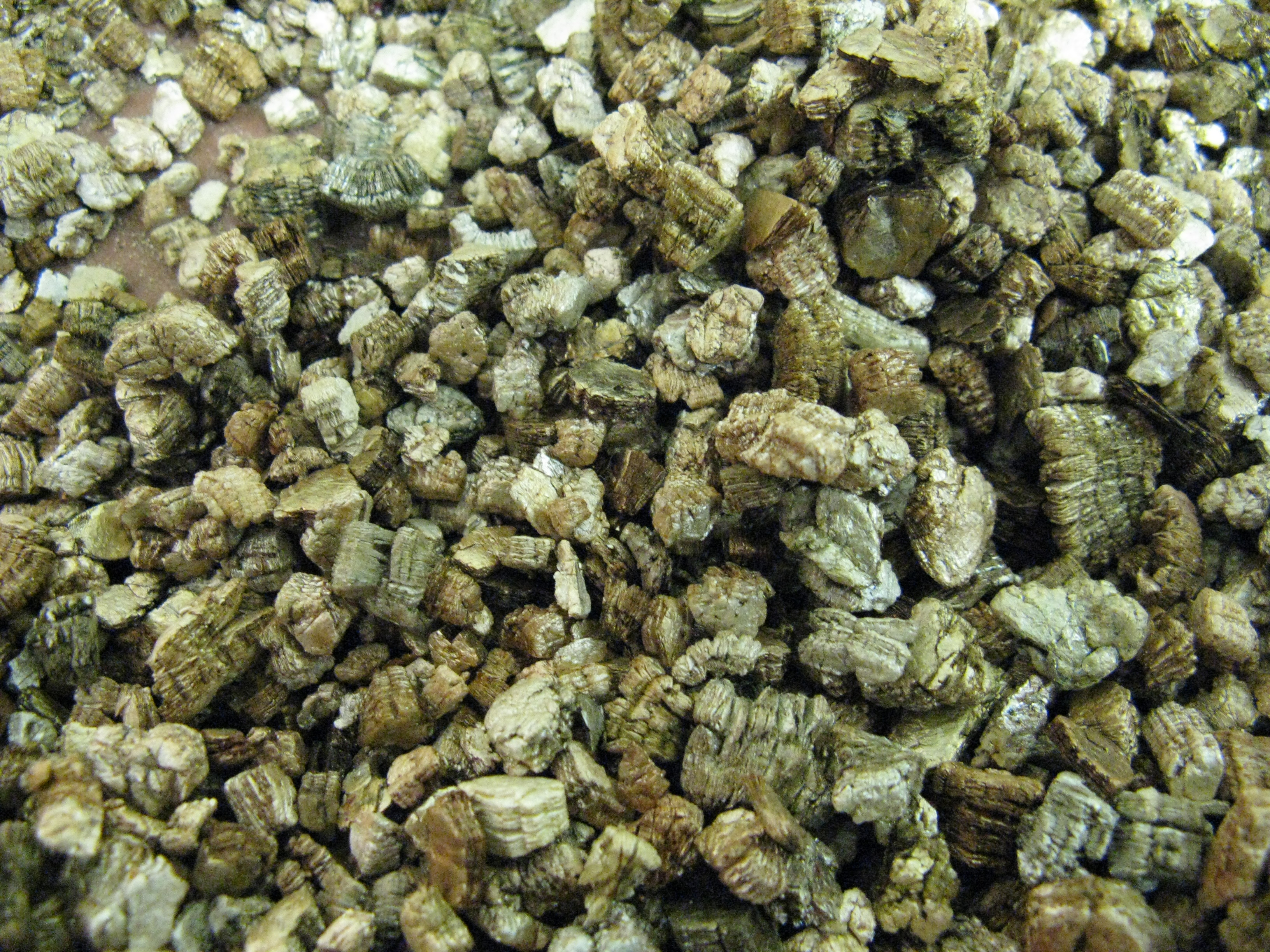 バーミキュライト